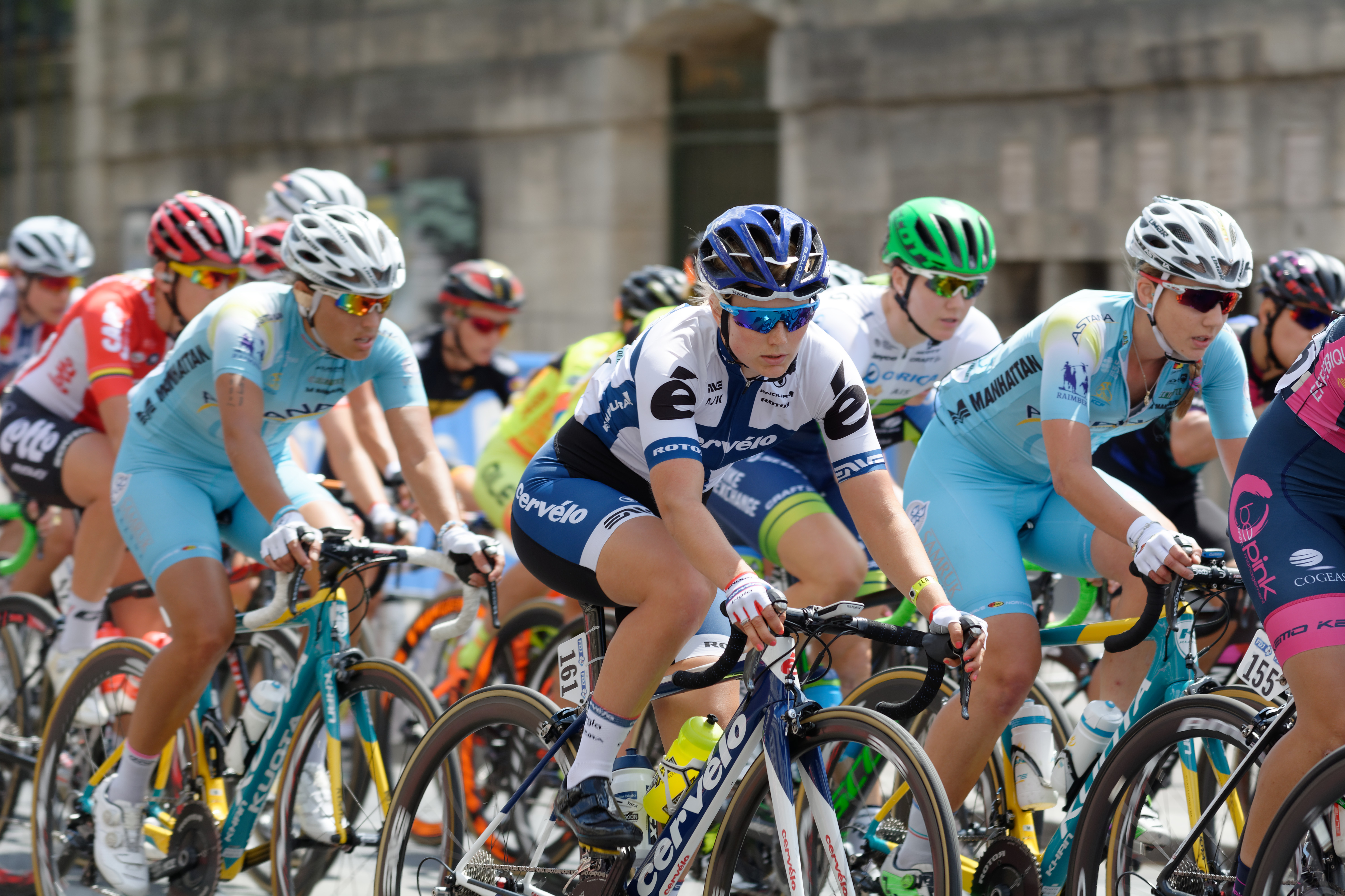 D71_9205_DxO